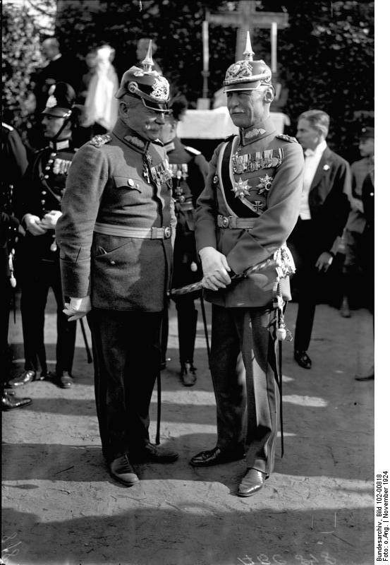 Zu dem Konflikt Exkronprinz Ruprecht von Bayern und Ludendorff. Zu dem Konflikt, in dem von beiden Seiten schwere Ehrenbeleidigung vorgekommen sein soll. Links General [Erich] Ludendorff, rechts Exkronprinz Ruprecht von Bayern.